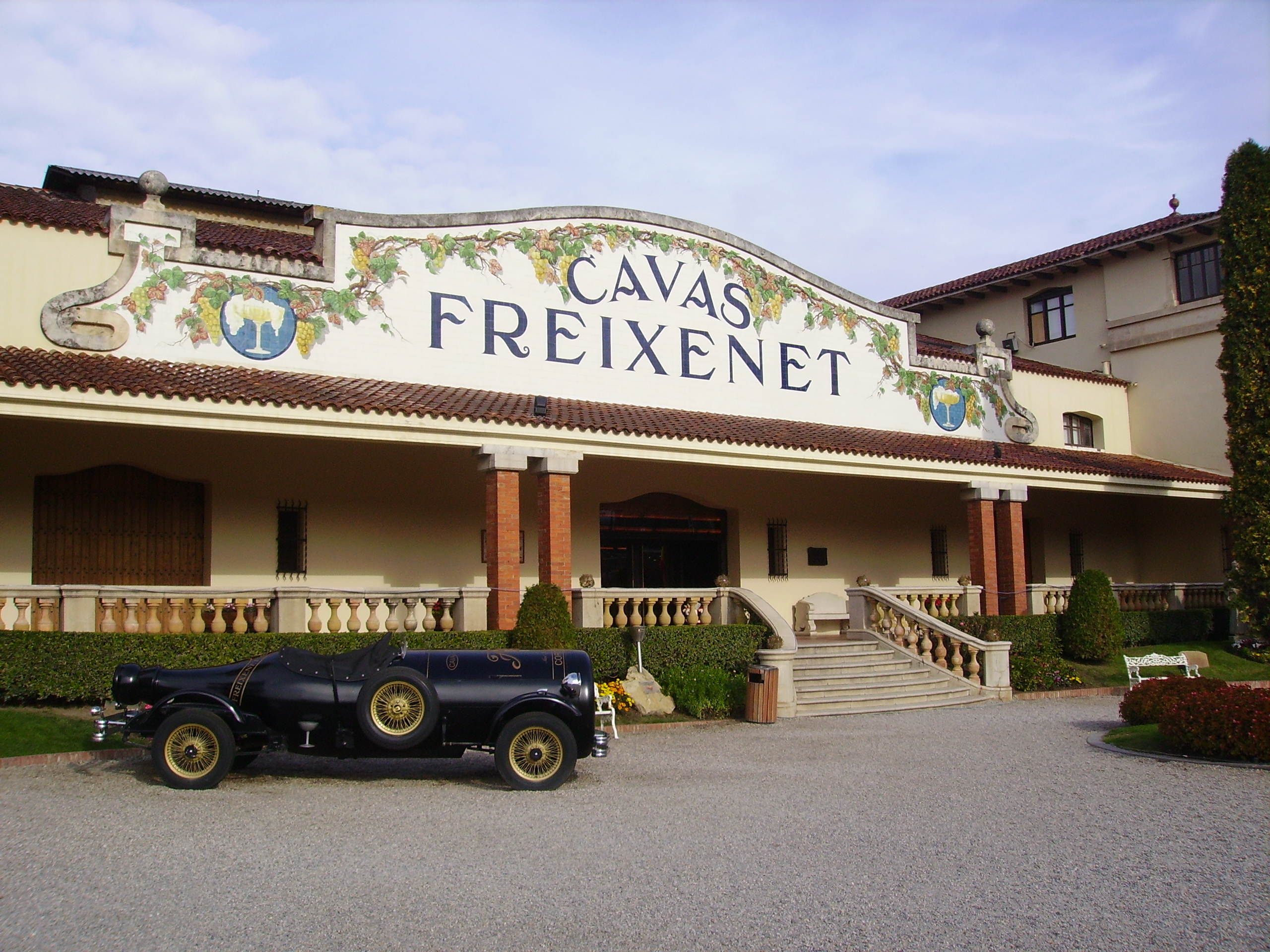 Entrada a les Caves Freixenet a Sant Sadurní d'Anoia, Alt Penedès, Catalunya. Obra de Josep Ros i Ros